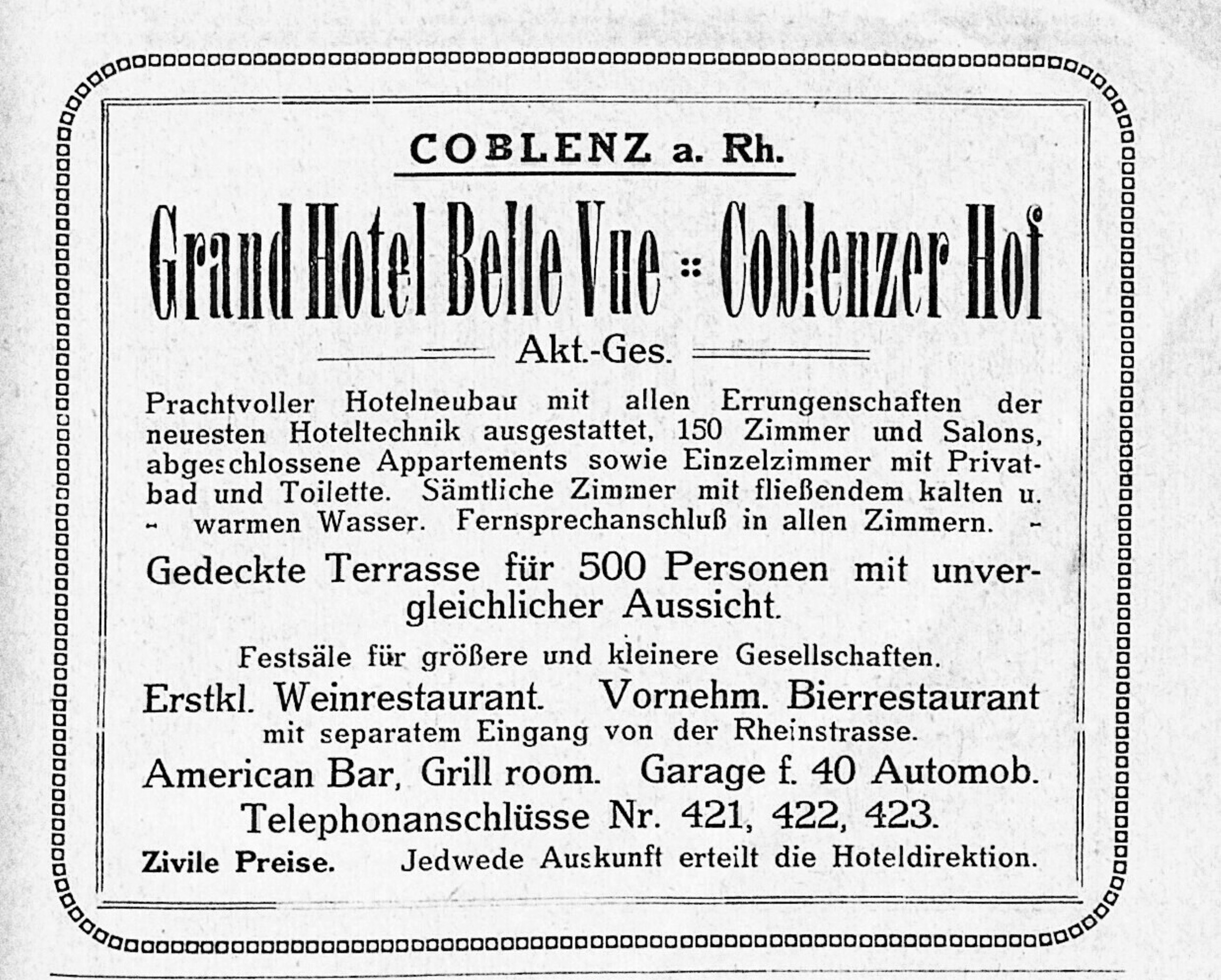 Werbeanzeige Grand Hotel Belle Vue = Coblenzer Hof, 1914